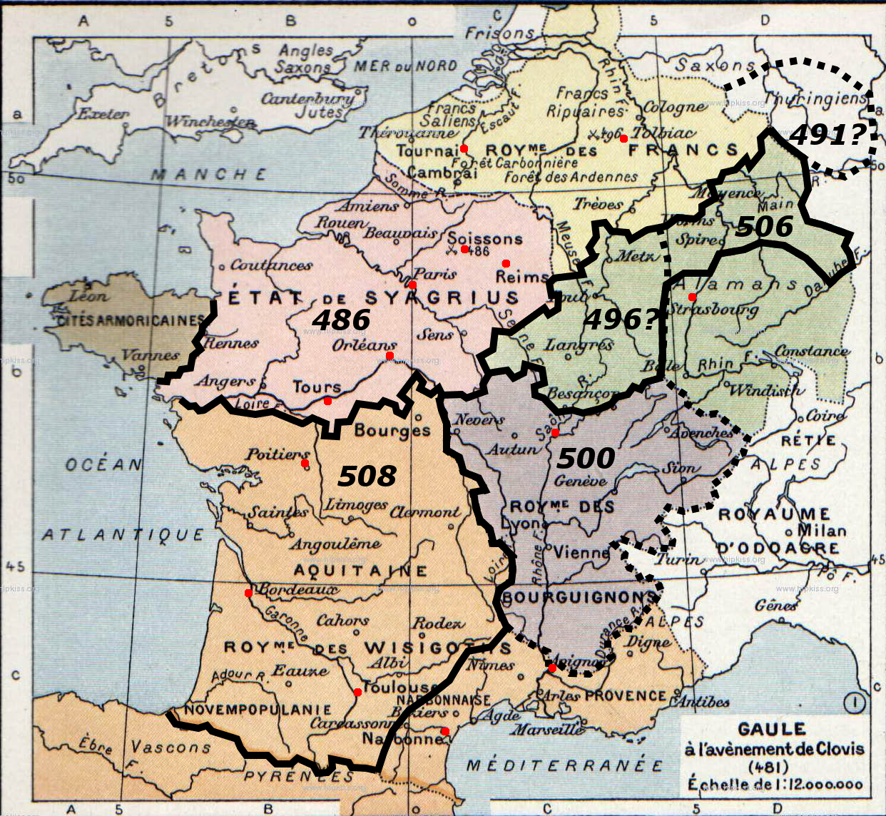 Weergave van de verovering van Gallie door Clovis, gebaseerd op bestand file:Politically divided Gaul, 481.jpg